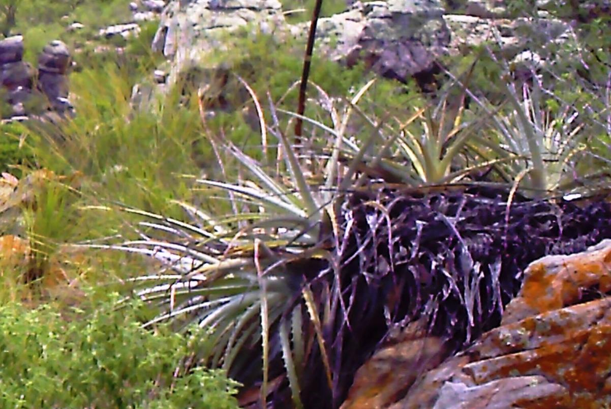 Foto de espécimes de Bromelia laciniosa (macambira)